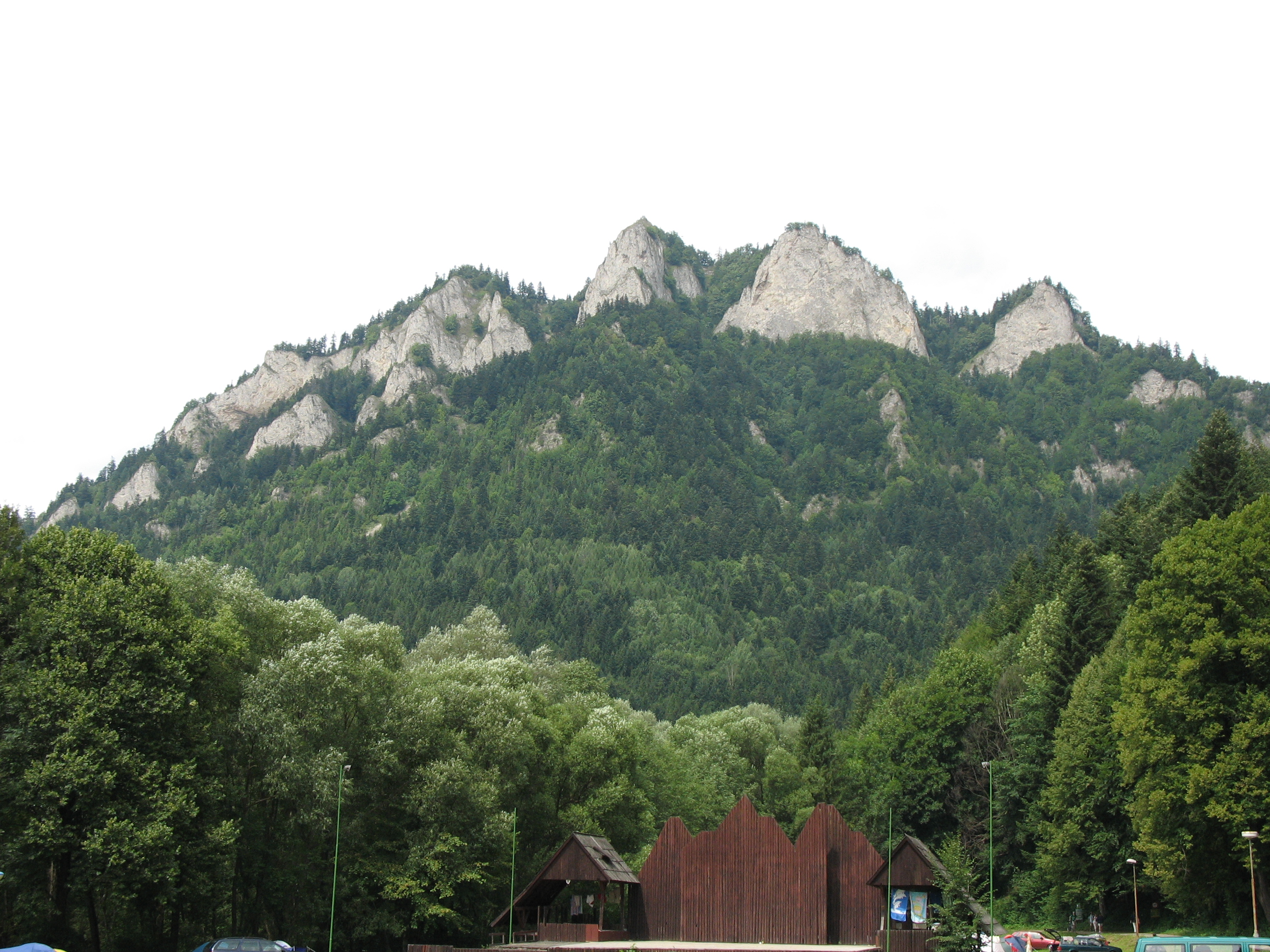 Trzy Korony - Widok z Czerwonego Klasztoru